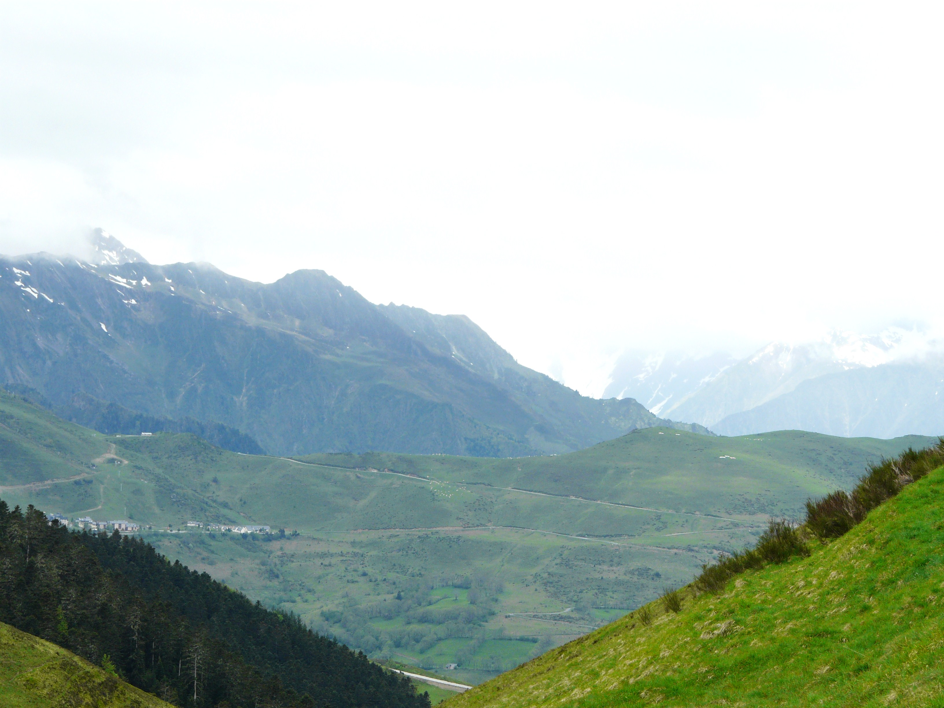 Le versant ouest du col de Peyresourde, commune de Loudervielle, Hautes-Pyrénées, France.